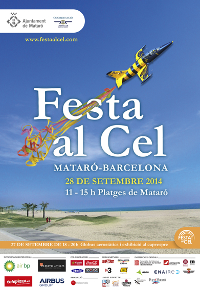 Festa al Cel. 28 de setembre, Platges de Mataró